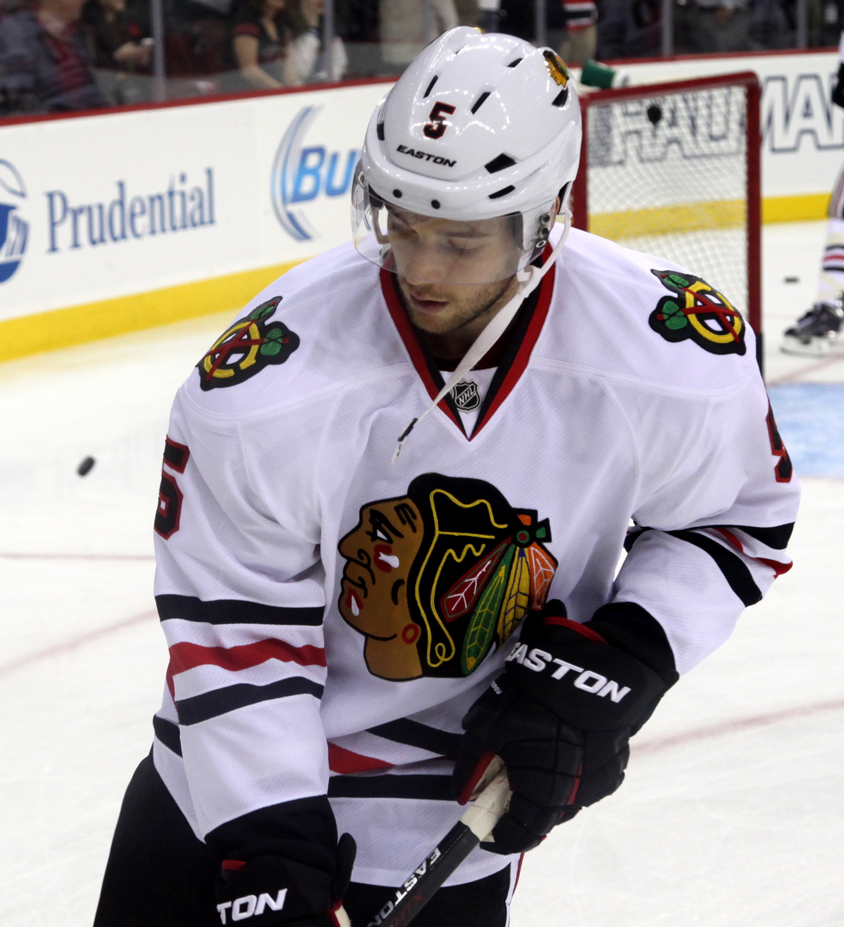 David Rundblad in December 2014.